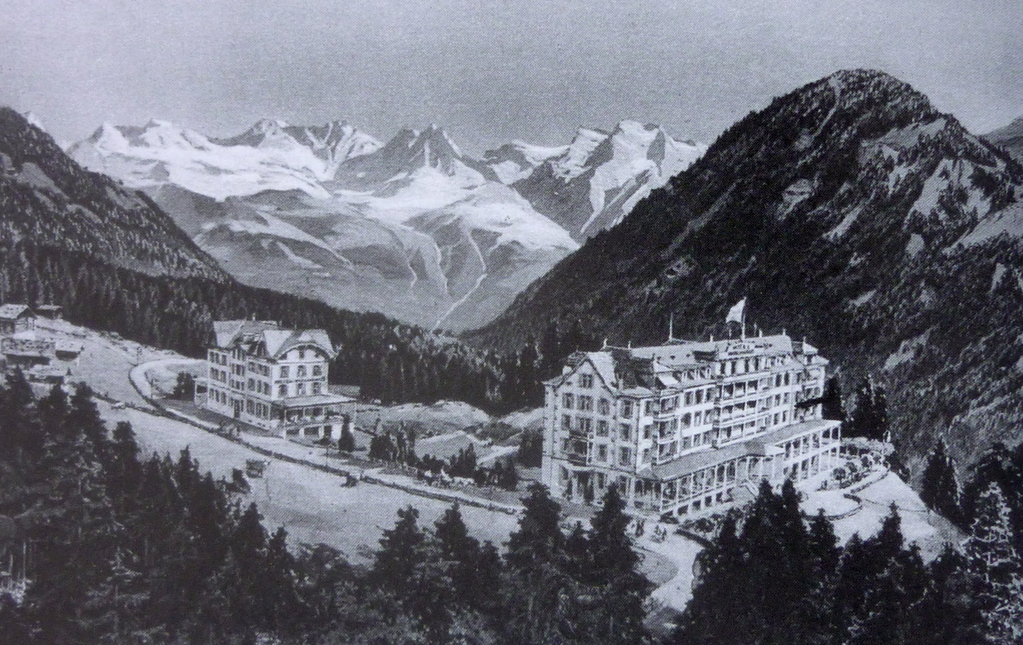 Hotel Tenigerbad im Val Sumvitg